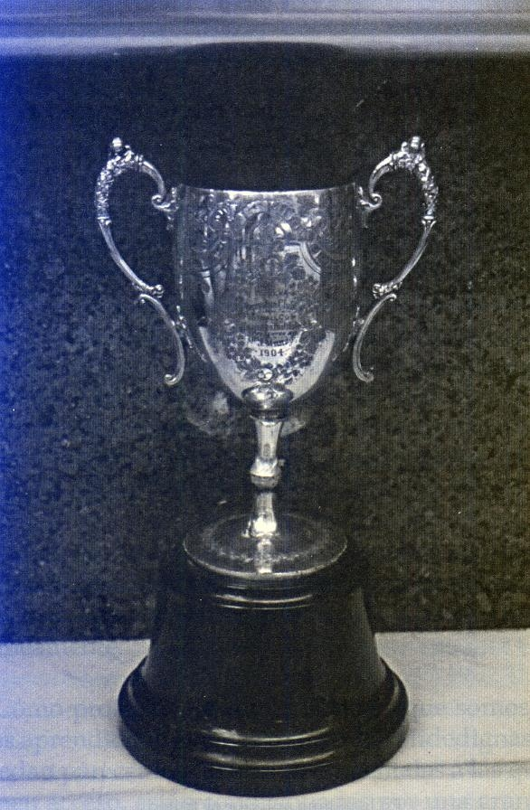 Copa Seaman´s institute de Huelva de 1904